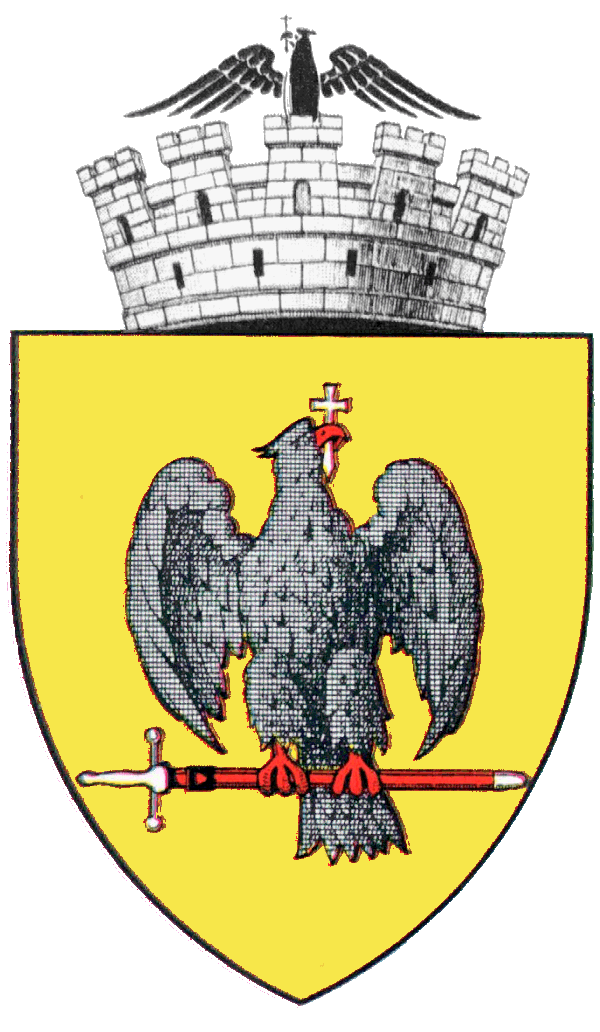 Coat of arms of Curtea de Argeş, Romania